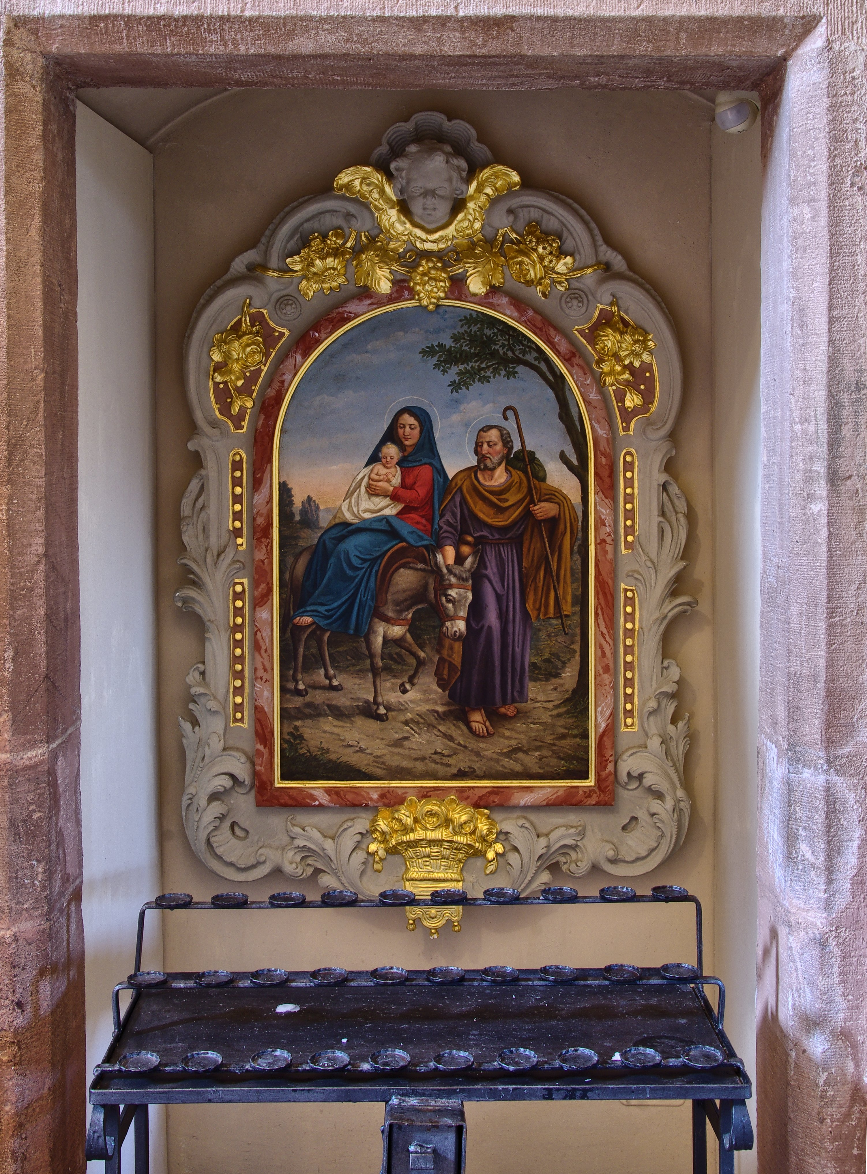 Die Pfarrkirche St.Nikolaus in Waldau Die Ortschaft Waldau gehört zu Titisee-Neustadt